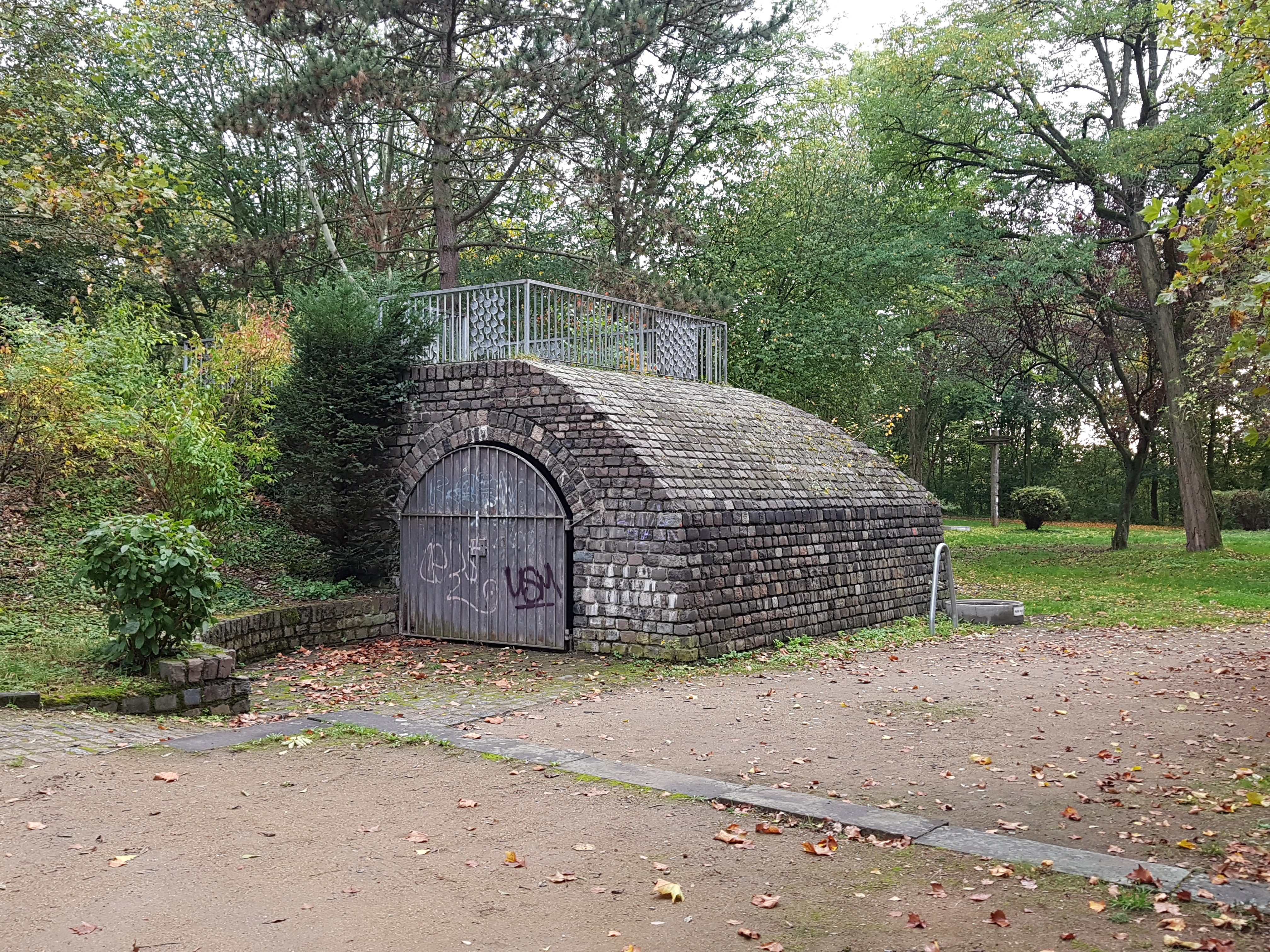 Dieses Gemäuer befindet sich ziemlich genau dort, wo das Reduit des Fort Hartmühl(e) lag.